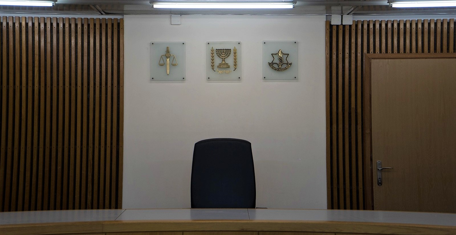 היכל בית הדין הצבאי